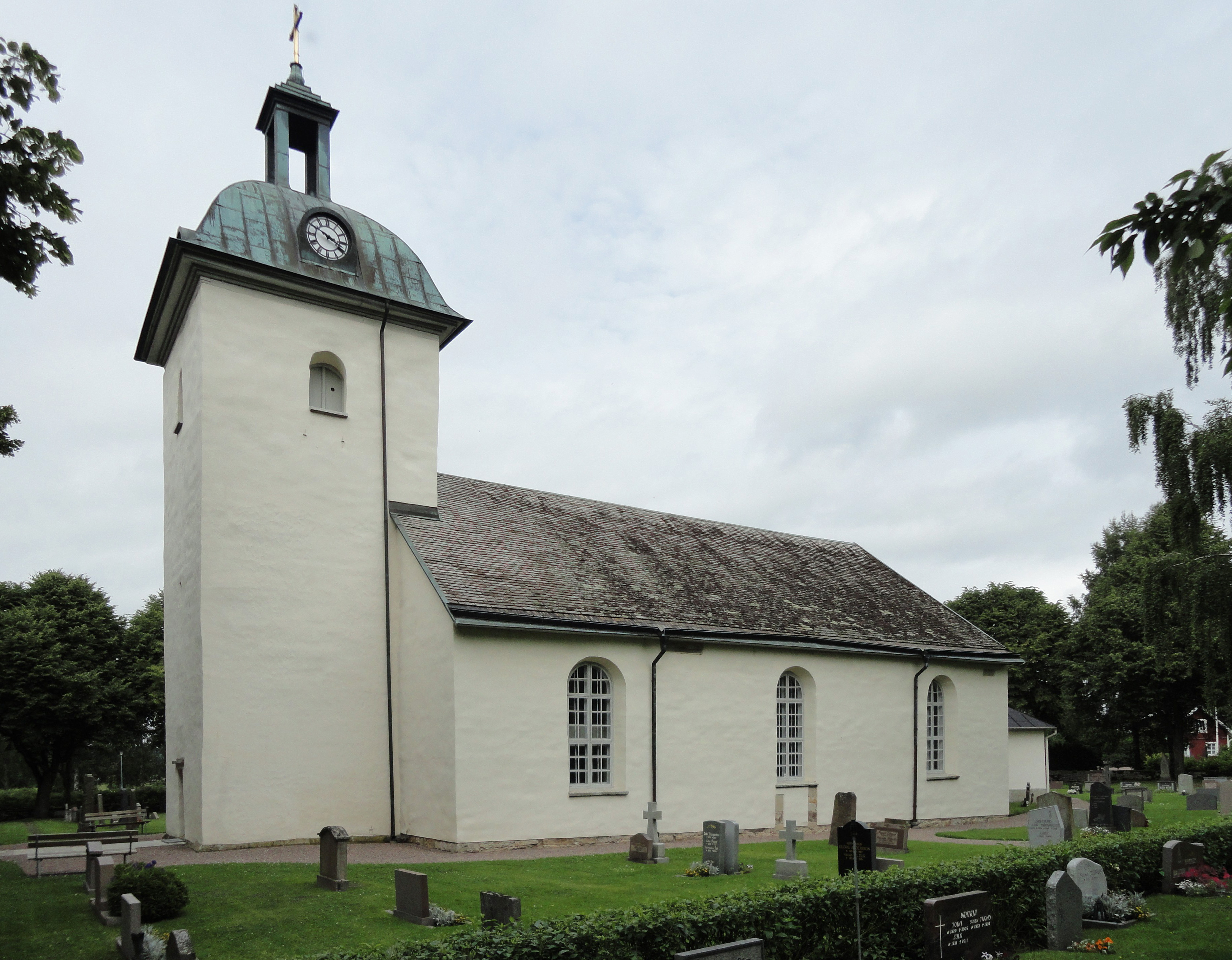 Källby kyrka, Götene kommun.